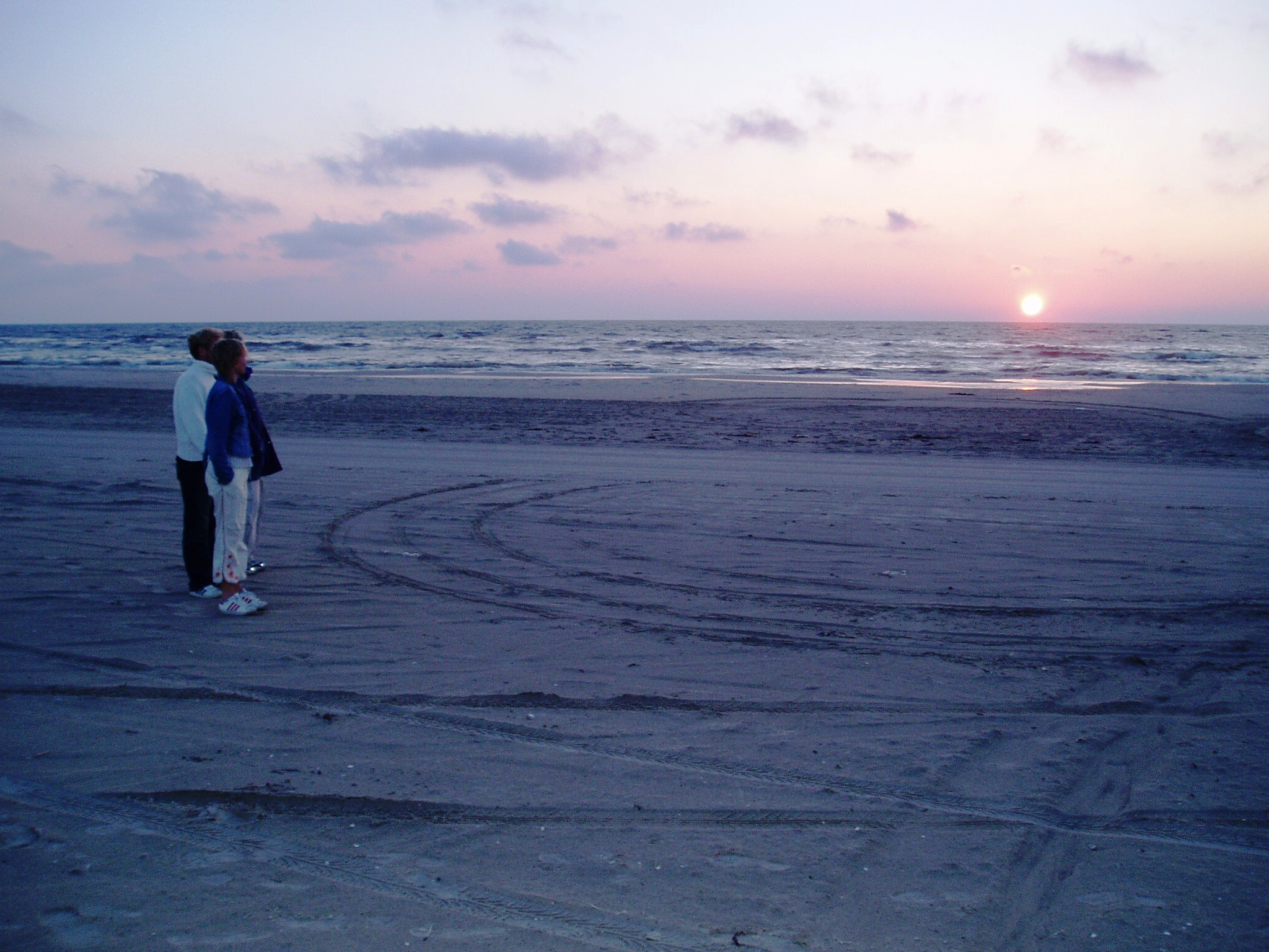 Roedhus Beach 19.07.2004